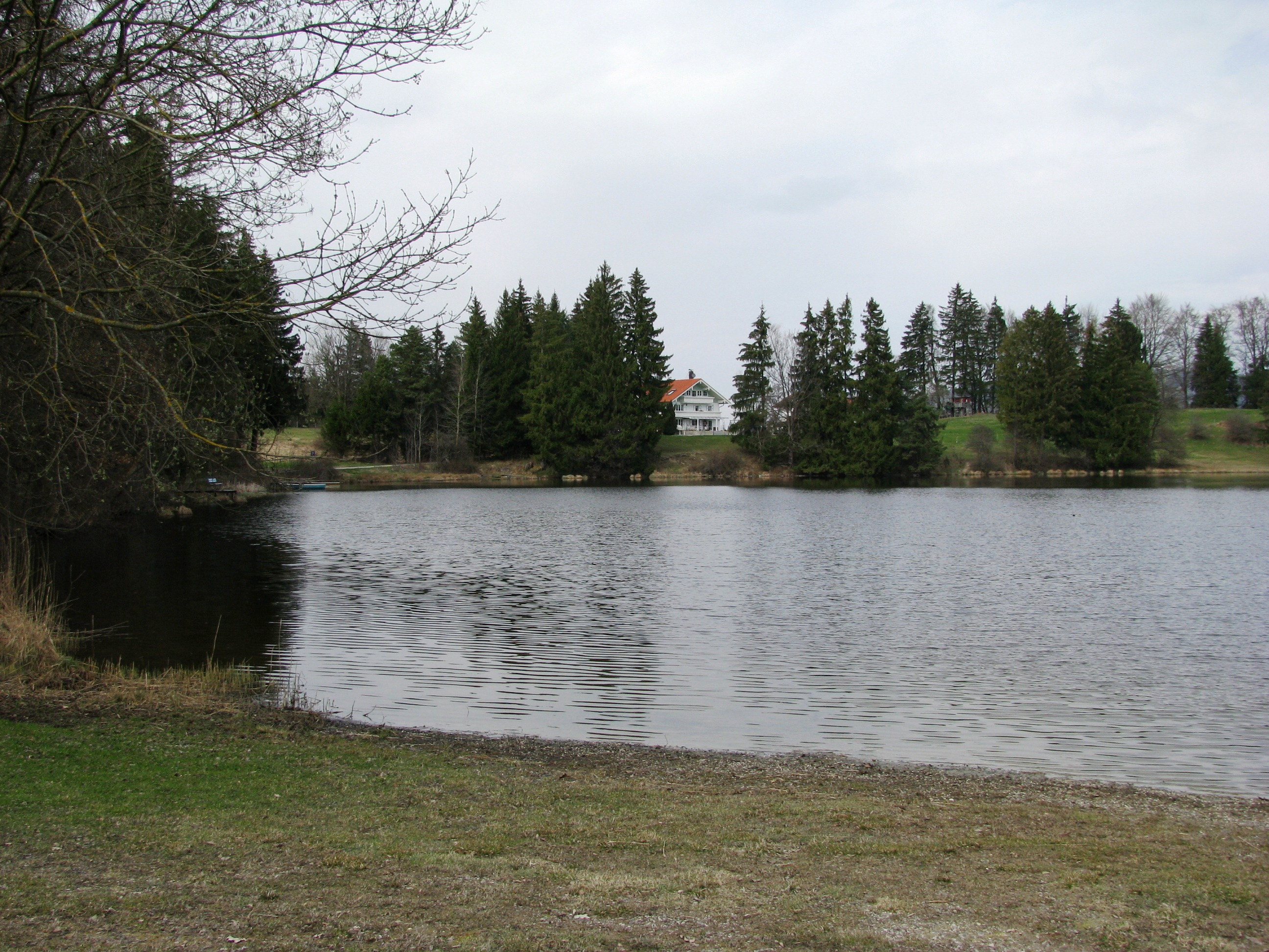 Lugenausee, links das Westufer